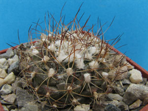 Turbinicarpus laui aus der Sammlung von „Andreae Kakteenkulturen“, Inh. Michael Januschkowetz, Ausserhalb Lengfeld 17, 64853 Otzberg-Lengfeld